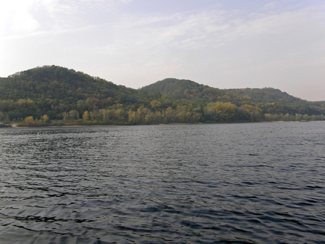 Канівський природний заповідник: Канівський природний заповідник